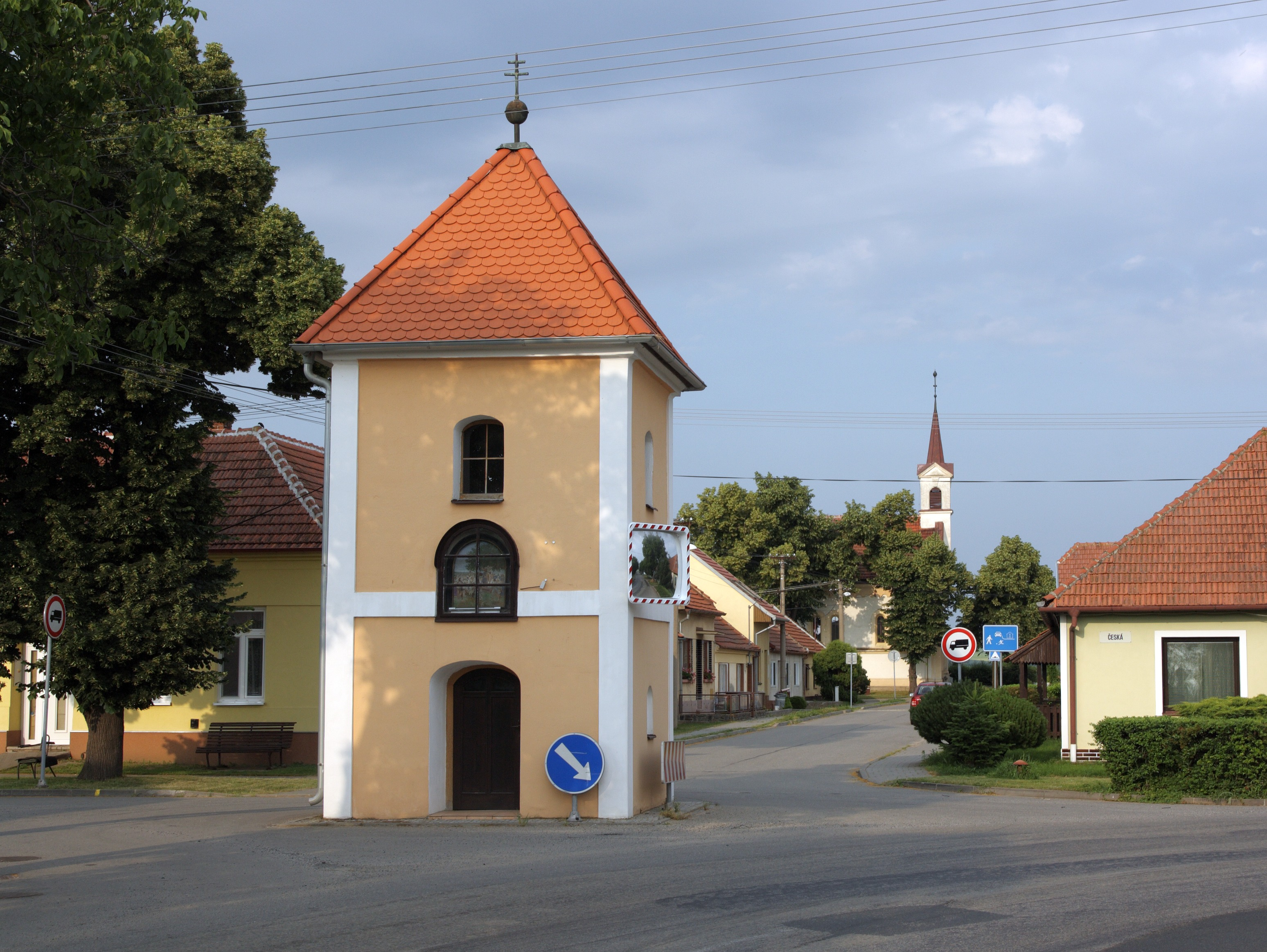 Rychmanov, zvonice.